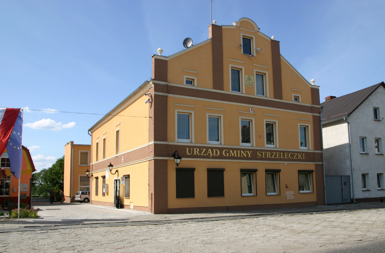 Strzeleczki (dodatkowa nazwa w j. niem. Klein Strehlitz[1]) – wieś w Polsce położona w województwie opolskim, w powiecie krapkowickim, w gminie Strzeleczki.